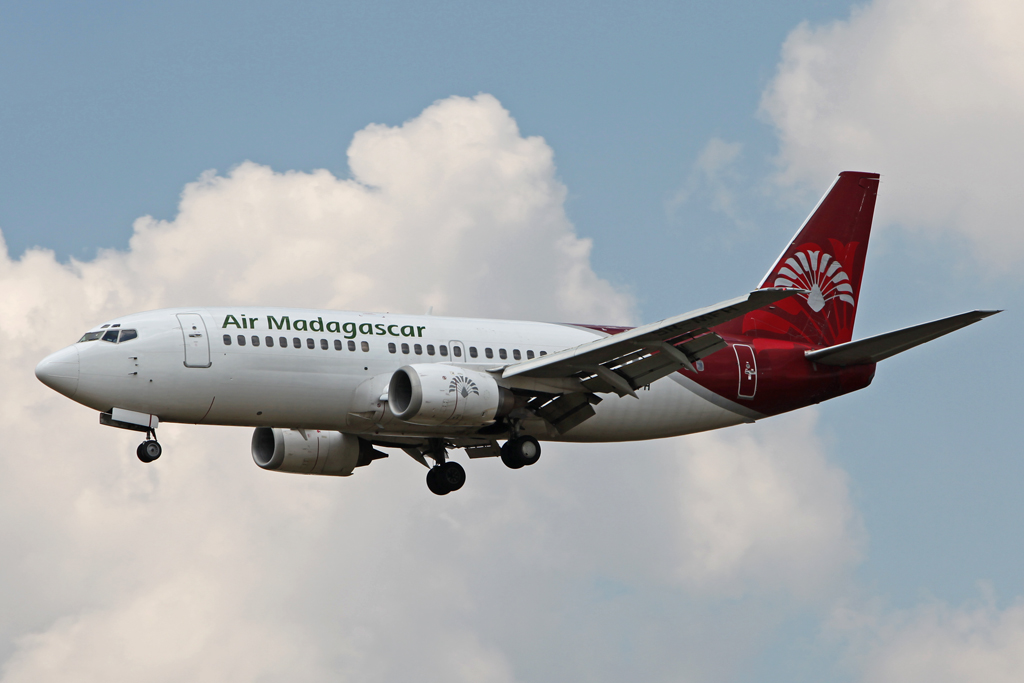 5R-MFH B737-300 Air Madagascar